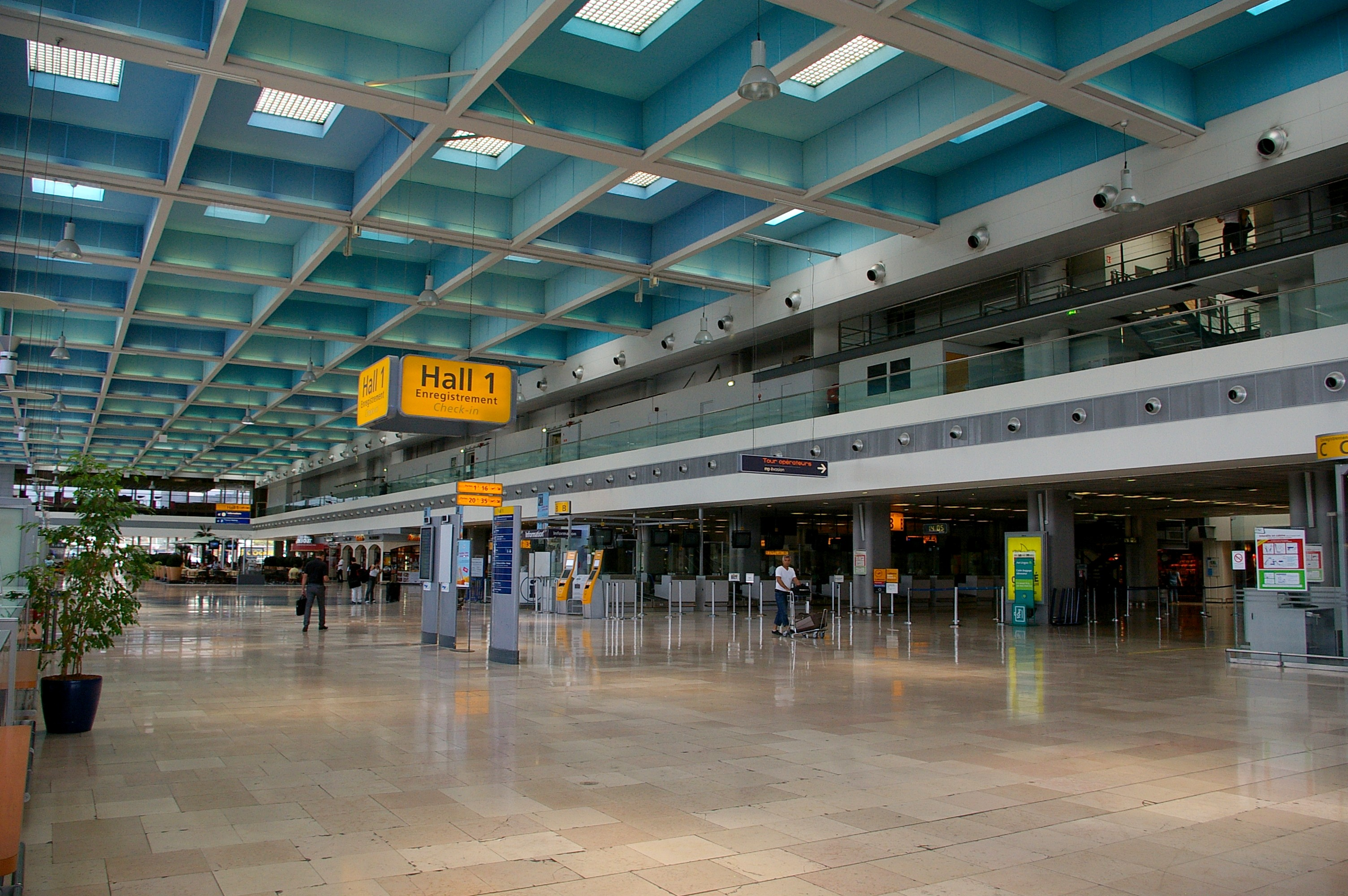 Le hall 1 de l'aéroport Marseille-Provence